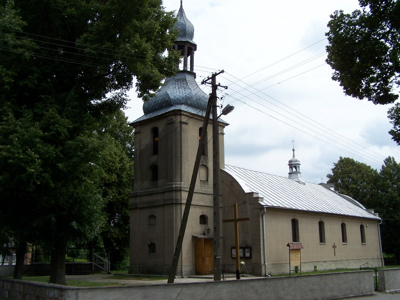 Polska, Lutynia, woj. wielkopolskie, powiat pleszewski, gmina Dobrzyca,Kościół pw. Wniebowzięcia Najświętszej Maryi Panny